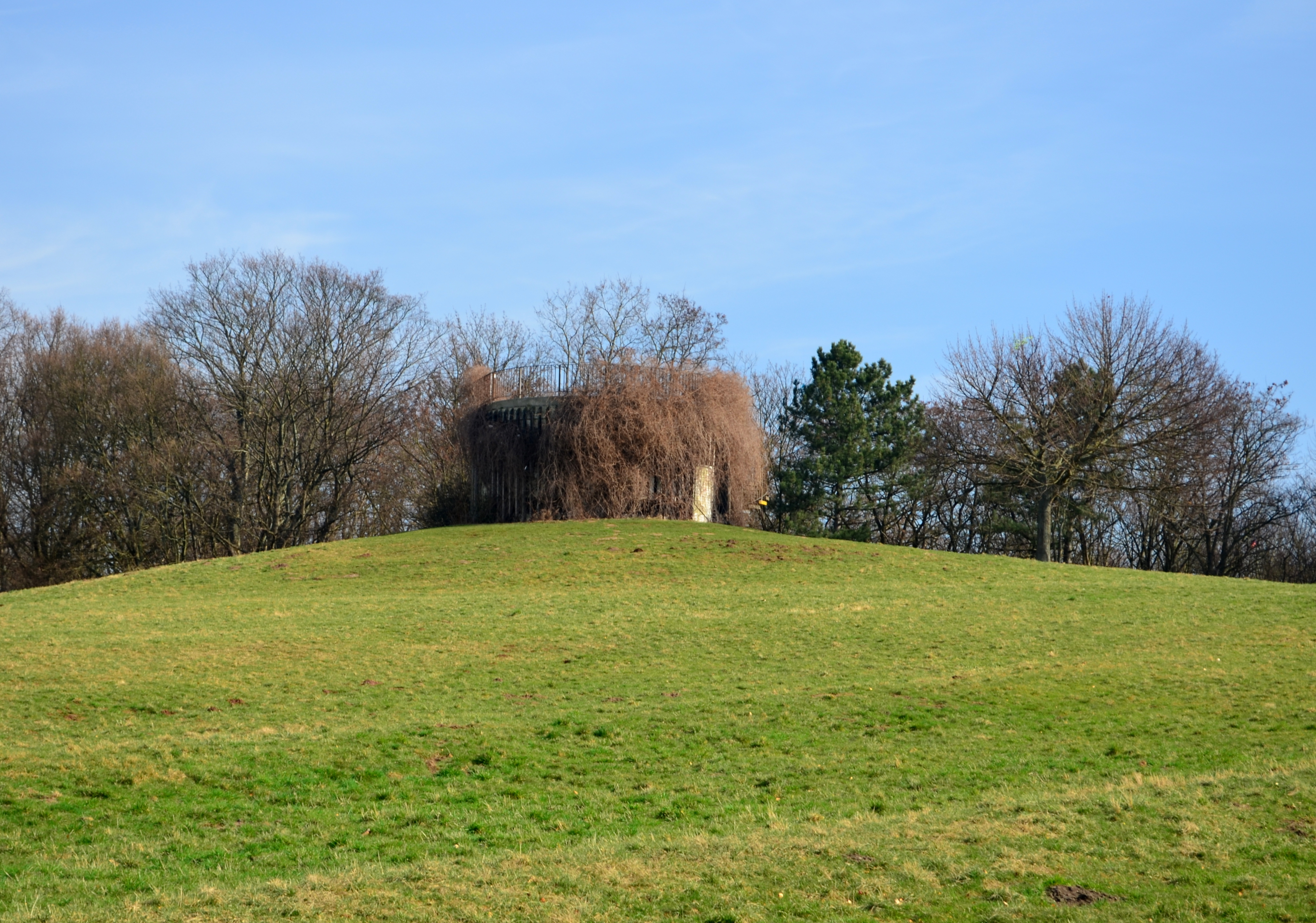 Braunschweig, Prinzenpark: Überrest des Bunkers des Kreisbefehlsstandes auf dem Nußberg im März 2015.